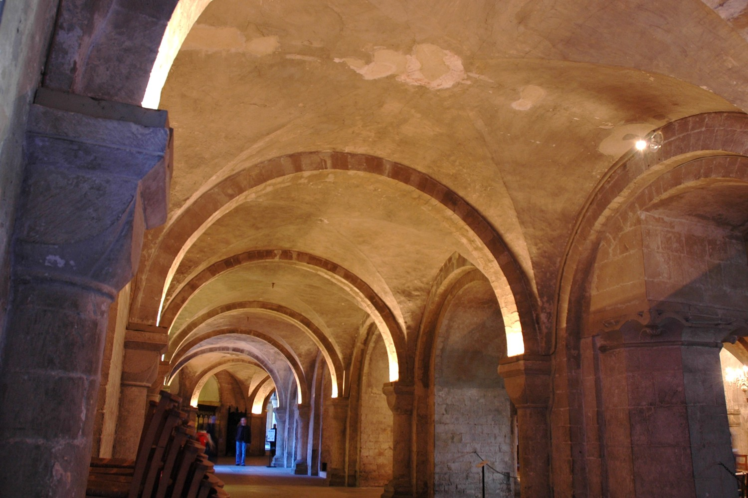 Cripta de la Catedral de Canterbury